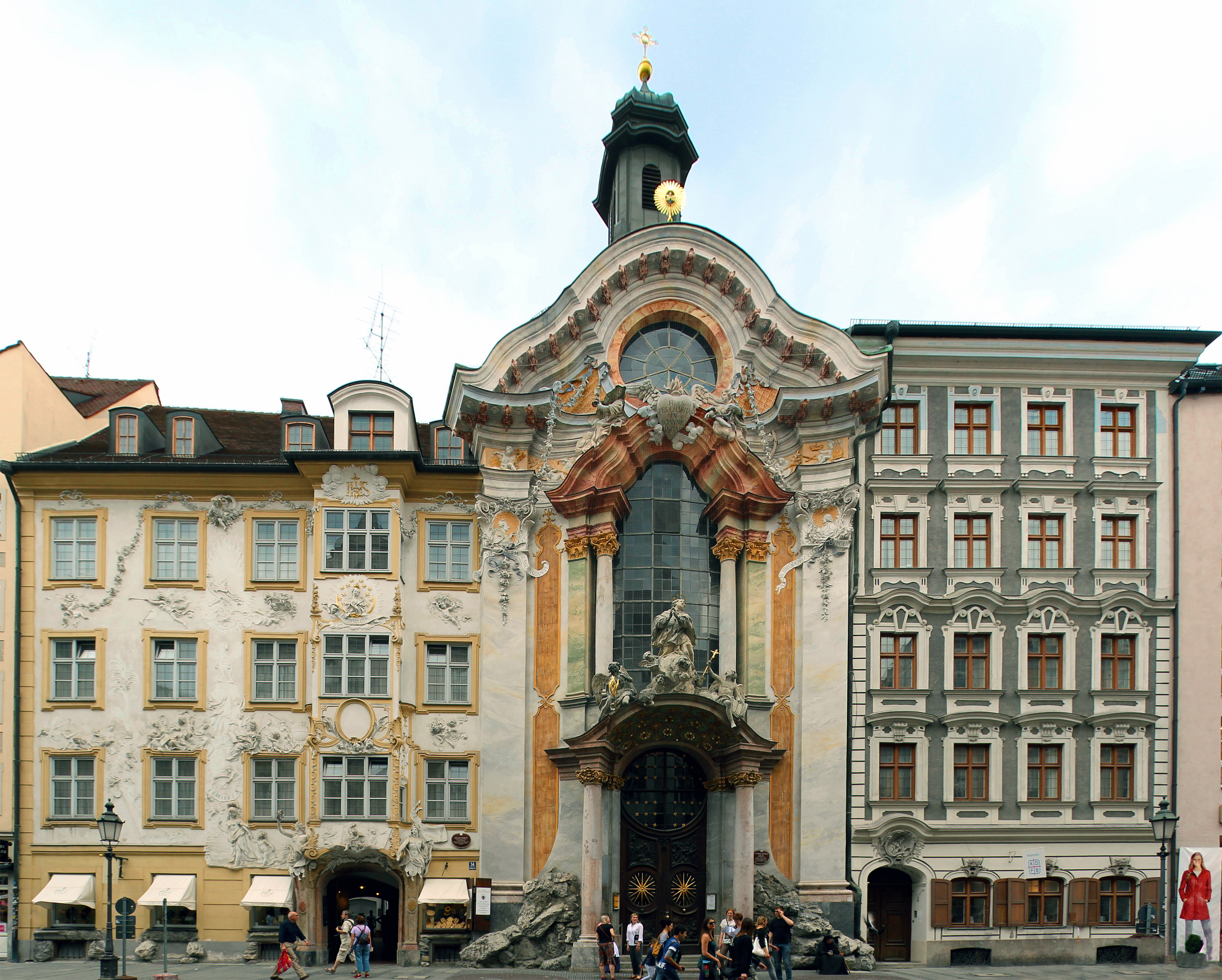 Die Asamkirche (St. Nepumuk) in München